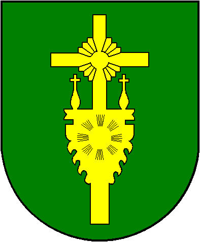 Surviliškio herbas